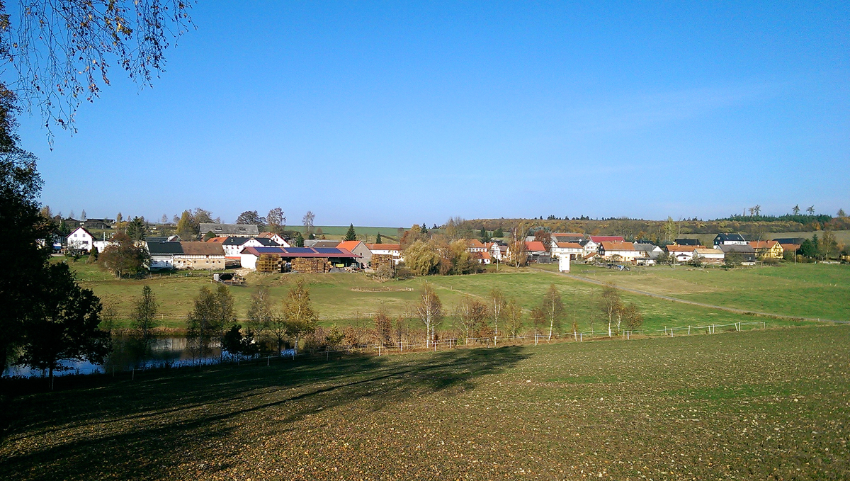 Külmla Ortsteil der Gemeinde Schöndorf